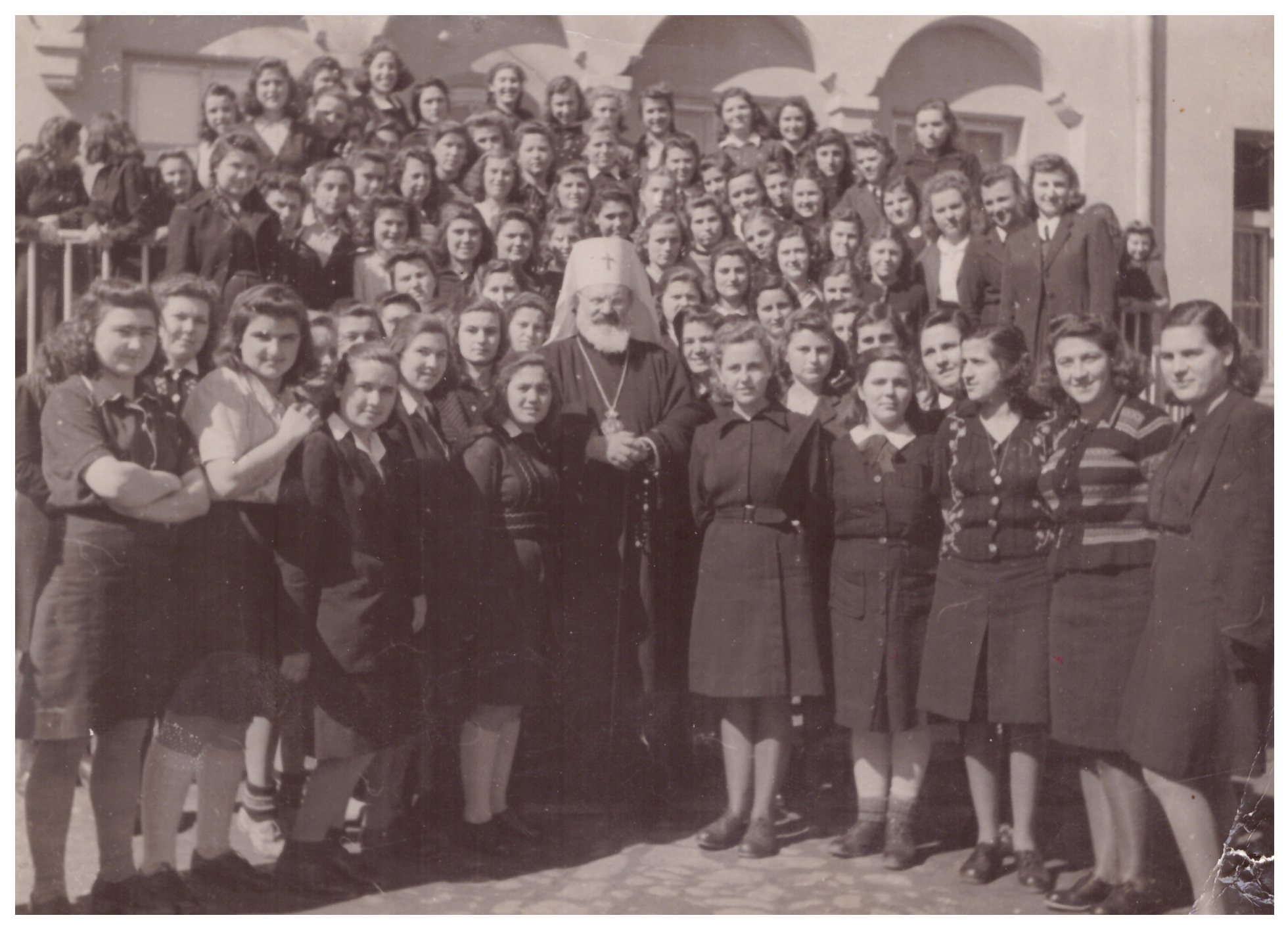 Екзарх Стефан на посещение в Девическата земеделска домакинска гимназия - Кюстендил, където 1946 г. директор е Георги Аракчиев